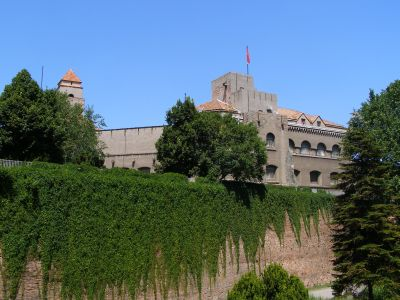 Kalemegdan, Belgrade